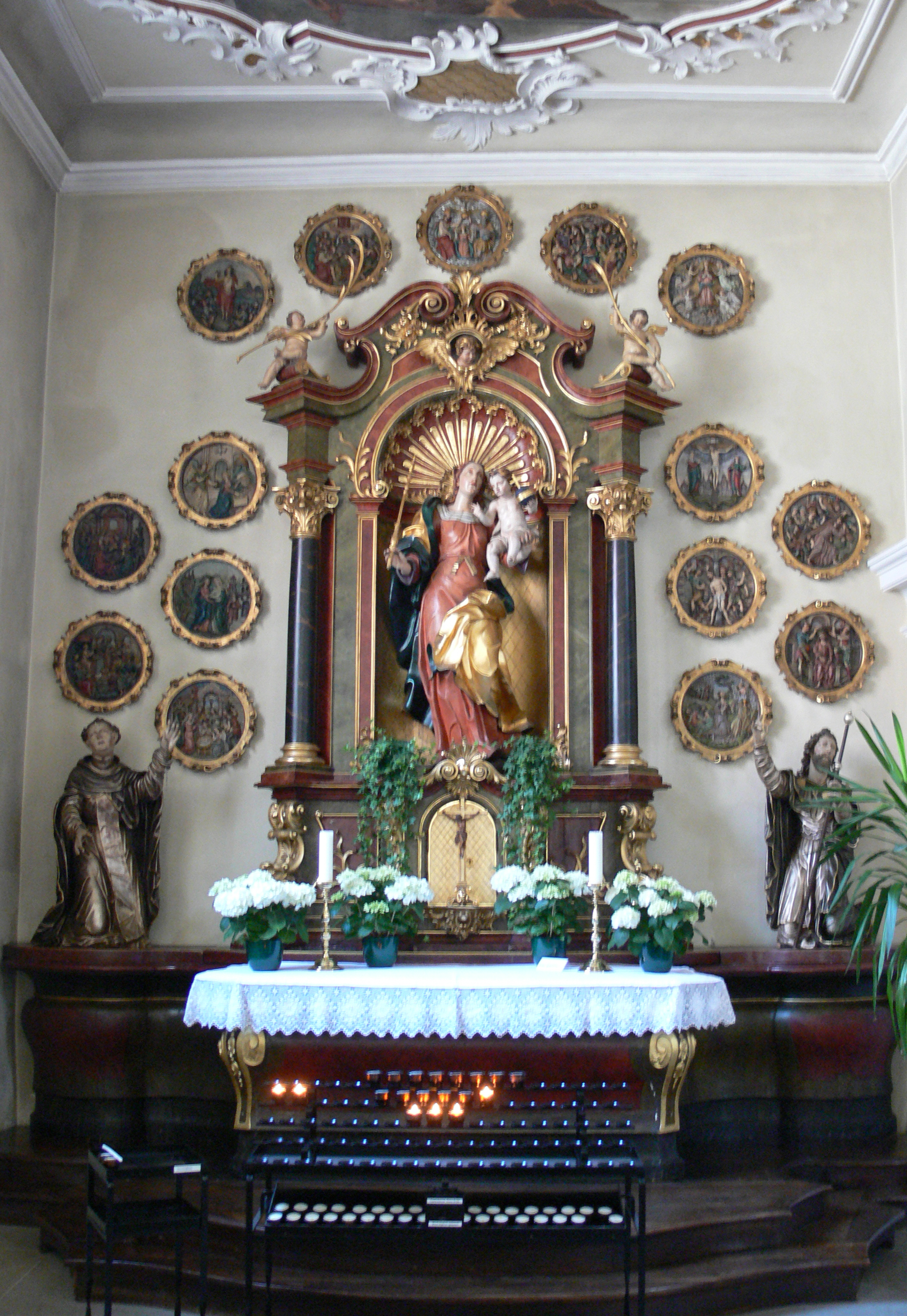 Pfullendorf, Stadtkirche St. Jakob Rosenkranzaltar mit Rokoko-Madonna von Franz Magnus Hops (1751), Jakobus-Figur (Zürn-Werkstatt, um 1615) und Dominikus-Figur (Zürn-Werkstatt, um 1615); an der Wand Rosenkranz-Medaillons von Martin Zürn (1615, teilweise um 1900 ersetzt)